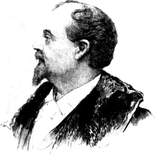 Gabriel Ferrier (1847-1914), French painter